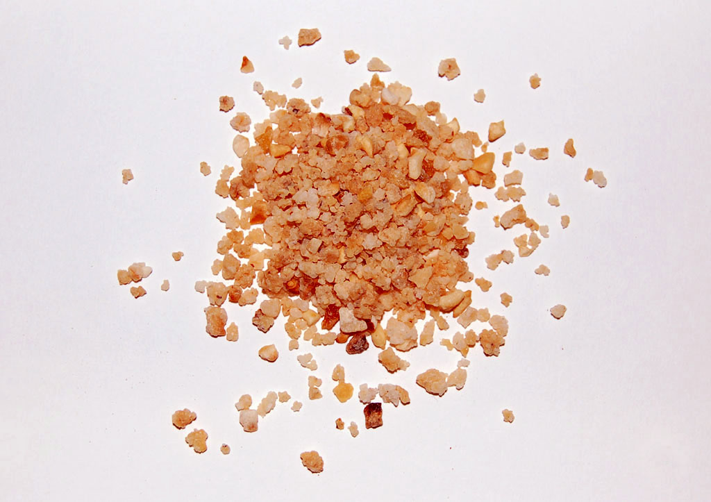 Beschreibung: Haselnusskrokant Description: Brittle made of Hazelnuts Quelle: selbst fotografiert, April 2006 Alice Wiegand, (Lyzzy)